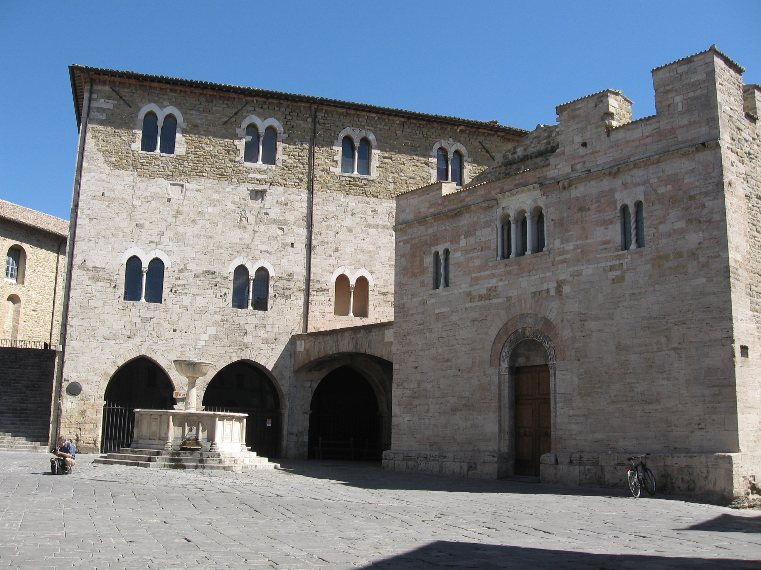 Bevagna, settembre 2006: la piazza con la chiesa di San Silvestro.